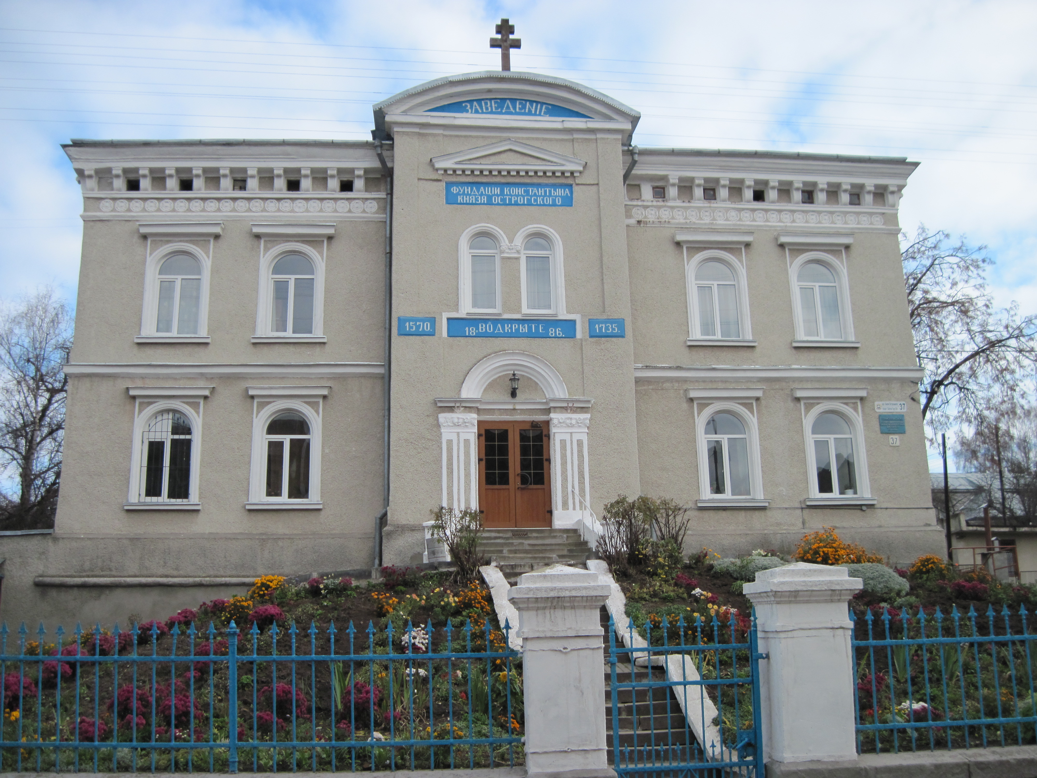 Будівля "Фундації Острозьких". Тернопіль, осінь 2013